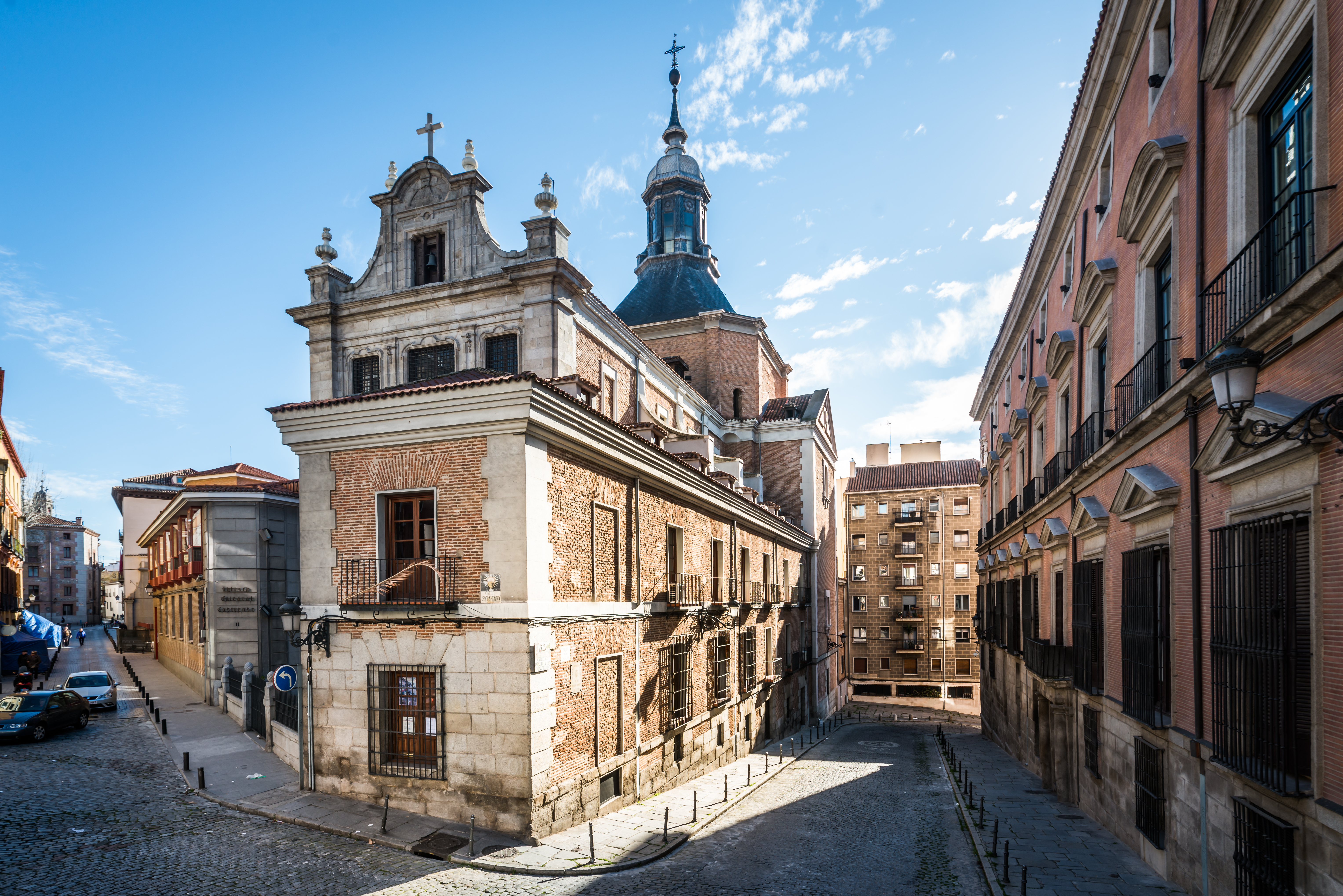 Iglesia del Sacramento (Catedral Castrense)